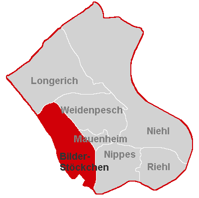 Lagekarte Bilderstöckchen im Stadtbezirk Köln-Nippes